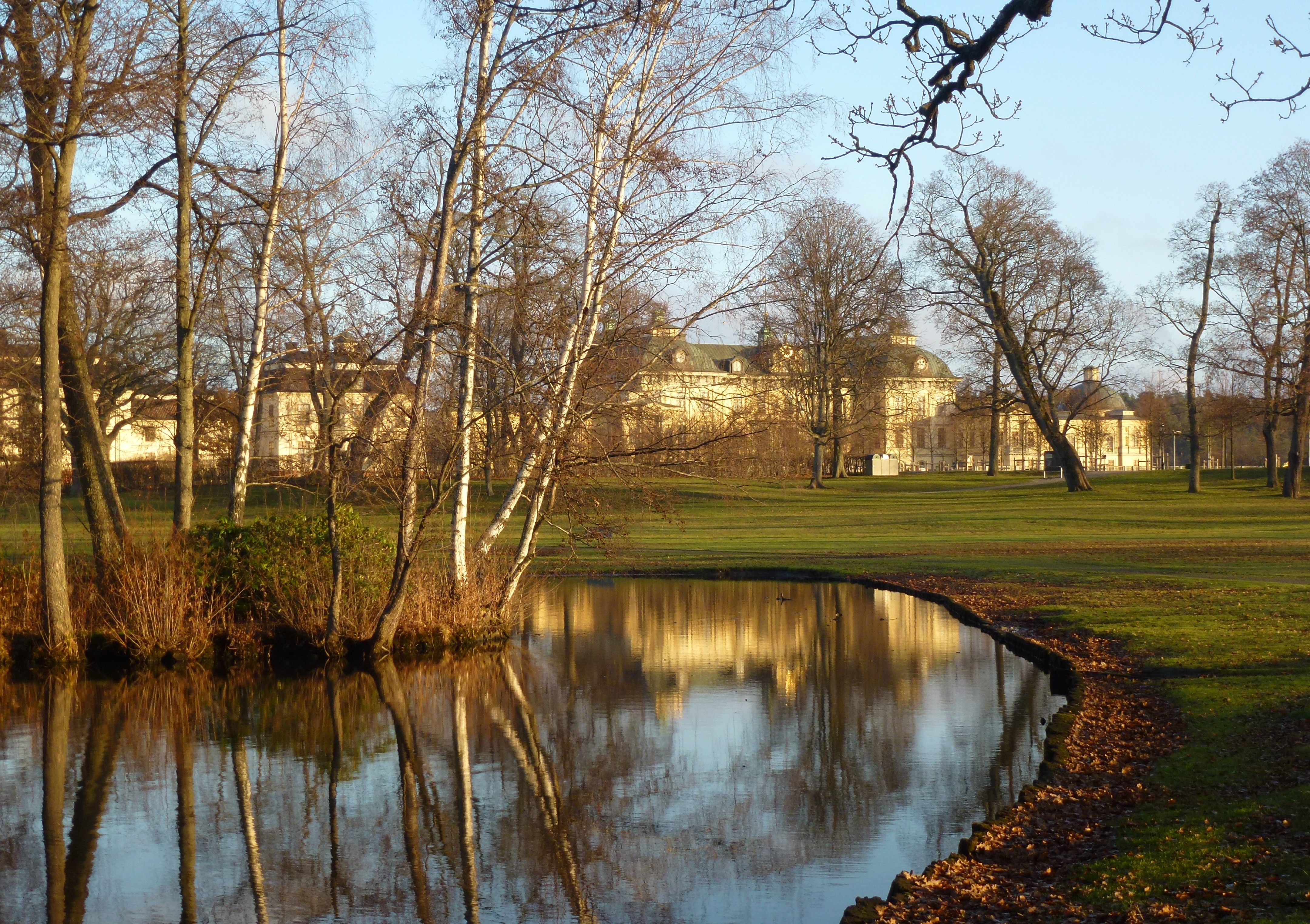 Drottningholms slott engelska parken med slottet i bakgrunden